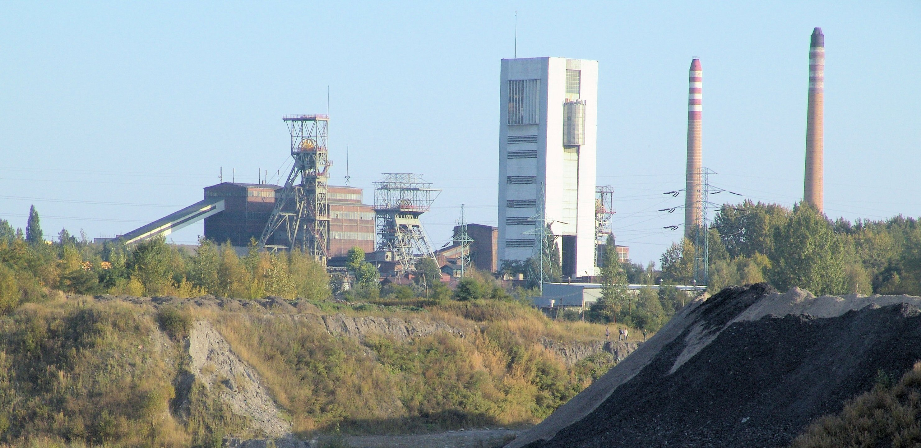 Kopalnia Centrum